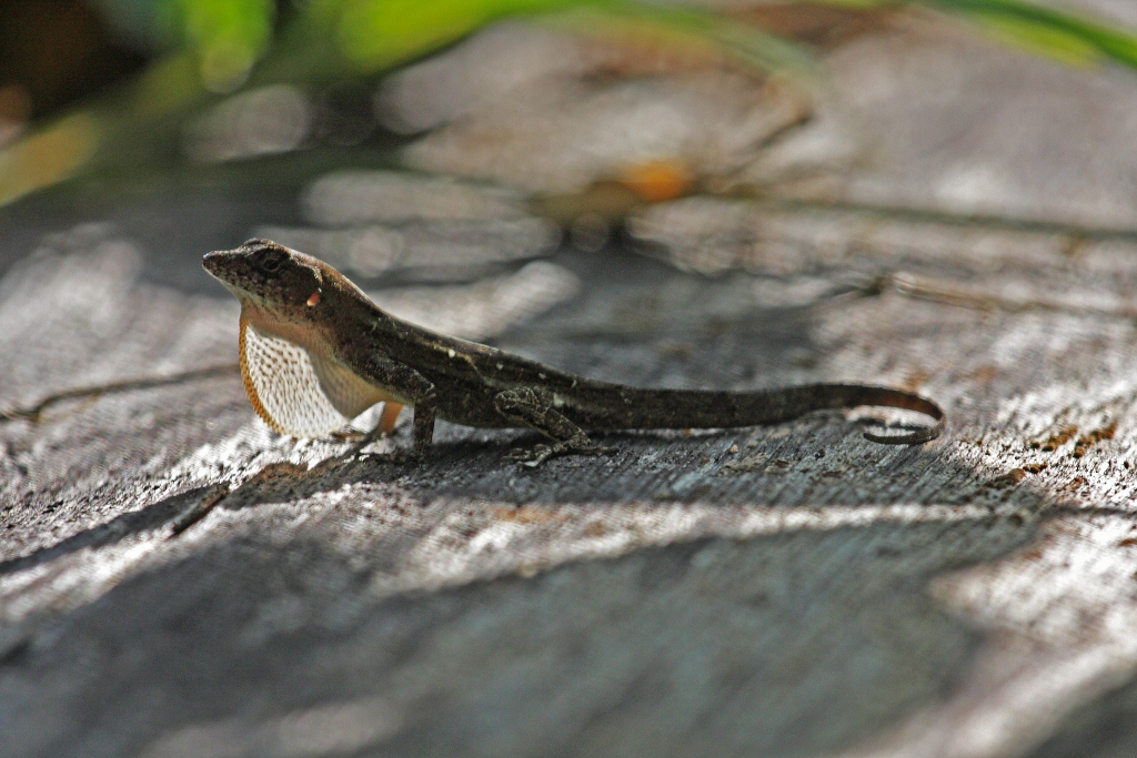 Topes de Collantes, Sancti Spíritus.